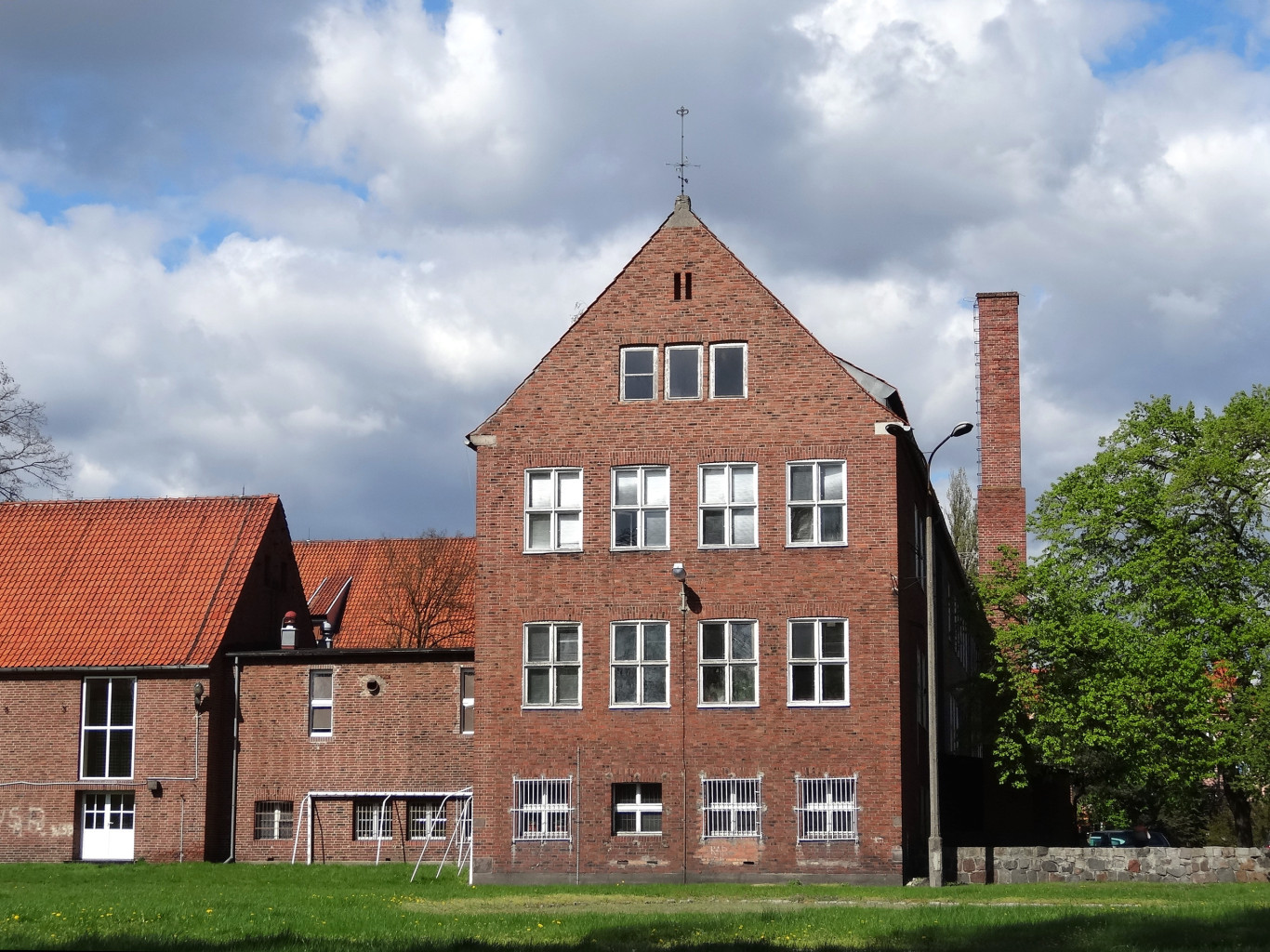 Uniwersytet Kazimierza Wielkiego w Bydgoszczy - fragment Collegium Maius przy ul. Chodkiewicza